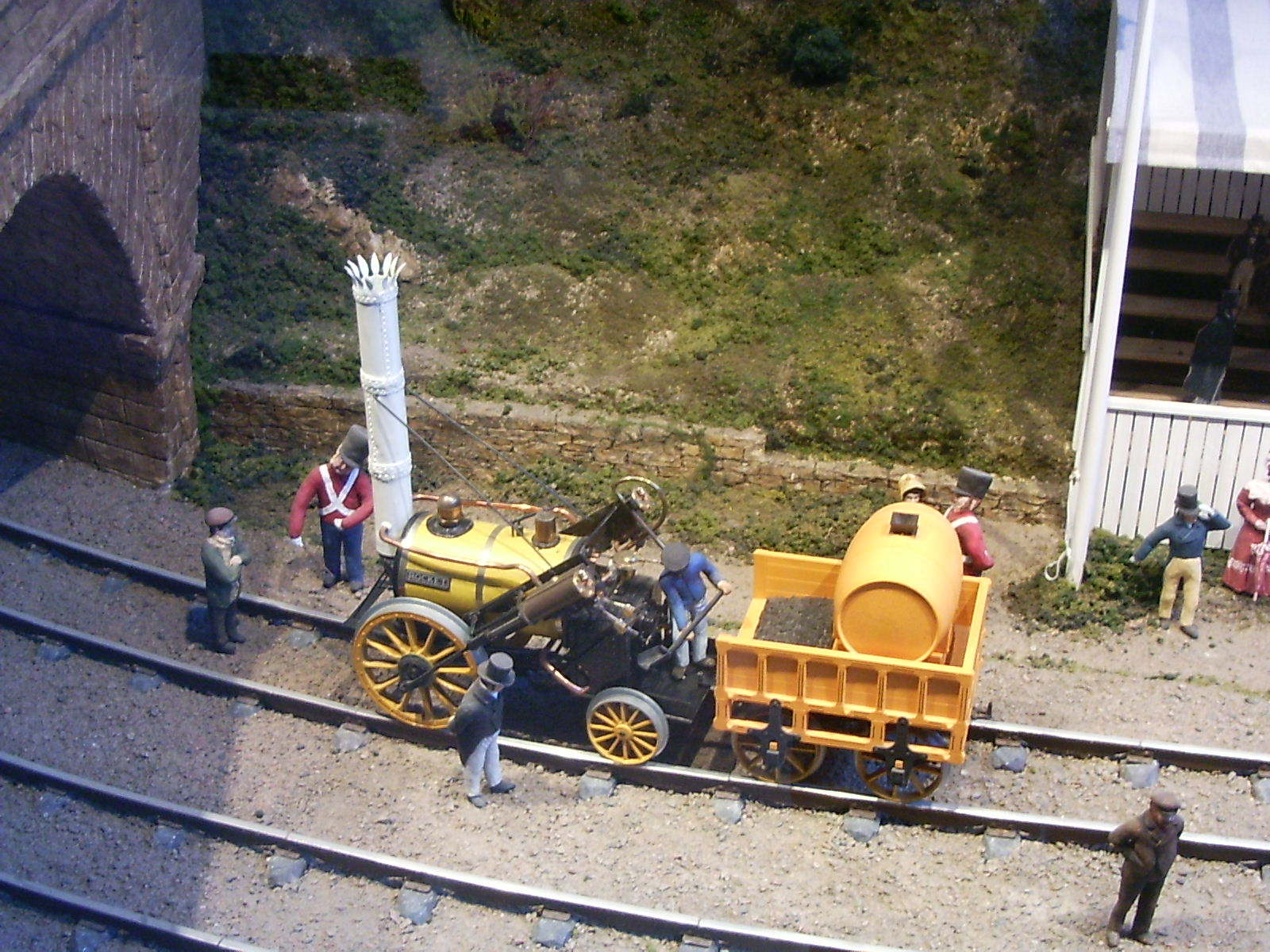 Järnvägens museum Ängelholm. Ängelholm, Ängelholm Rocket